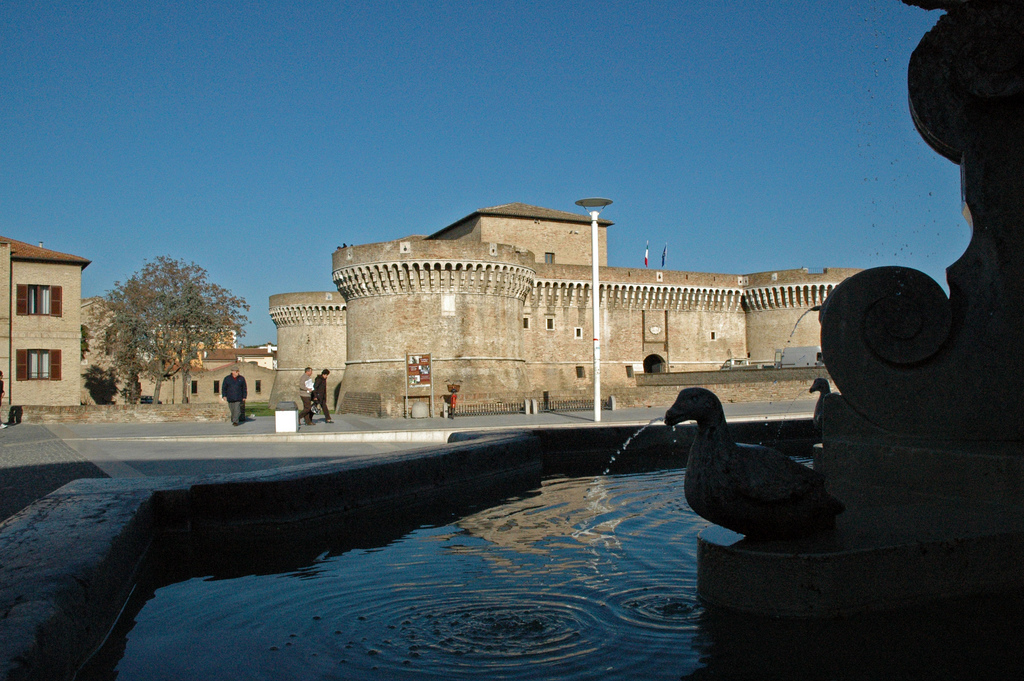 Piazza del Duca